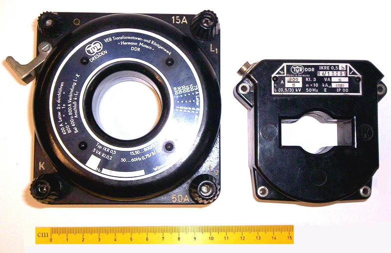 Bildbeschreibung: Ältere Stromwandler, Hersteller VEB Transformatoren- und Röntgenwerk Dresden Fotograf/Zeichner: Ulfbastel Datum: 11.7.2006 andere Versionen: ...